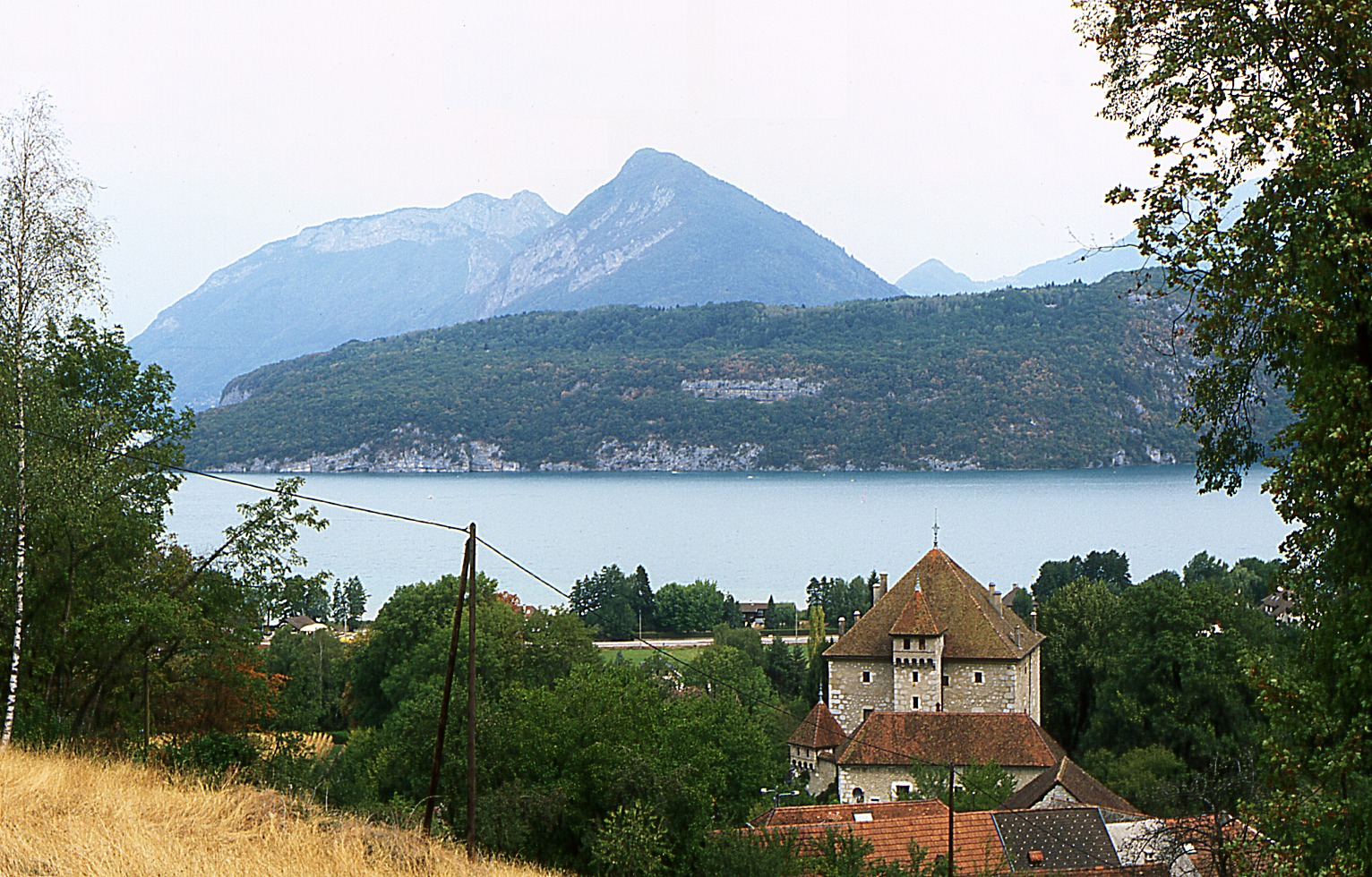 Le château de Dhéré.